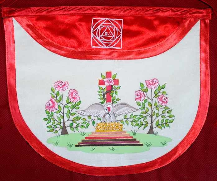 Tablier de 4e ordre du RFM, peint à la main sur soie.